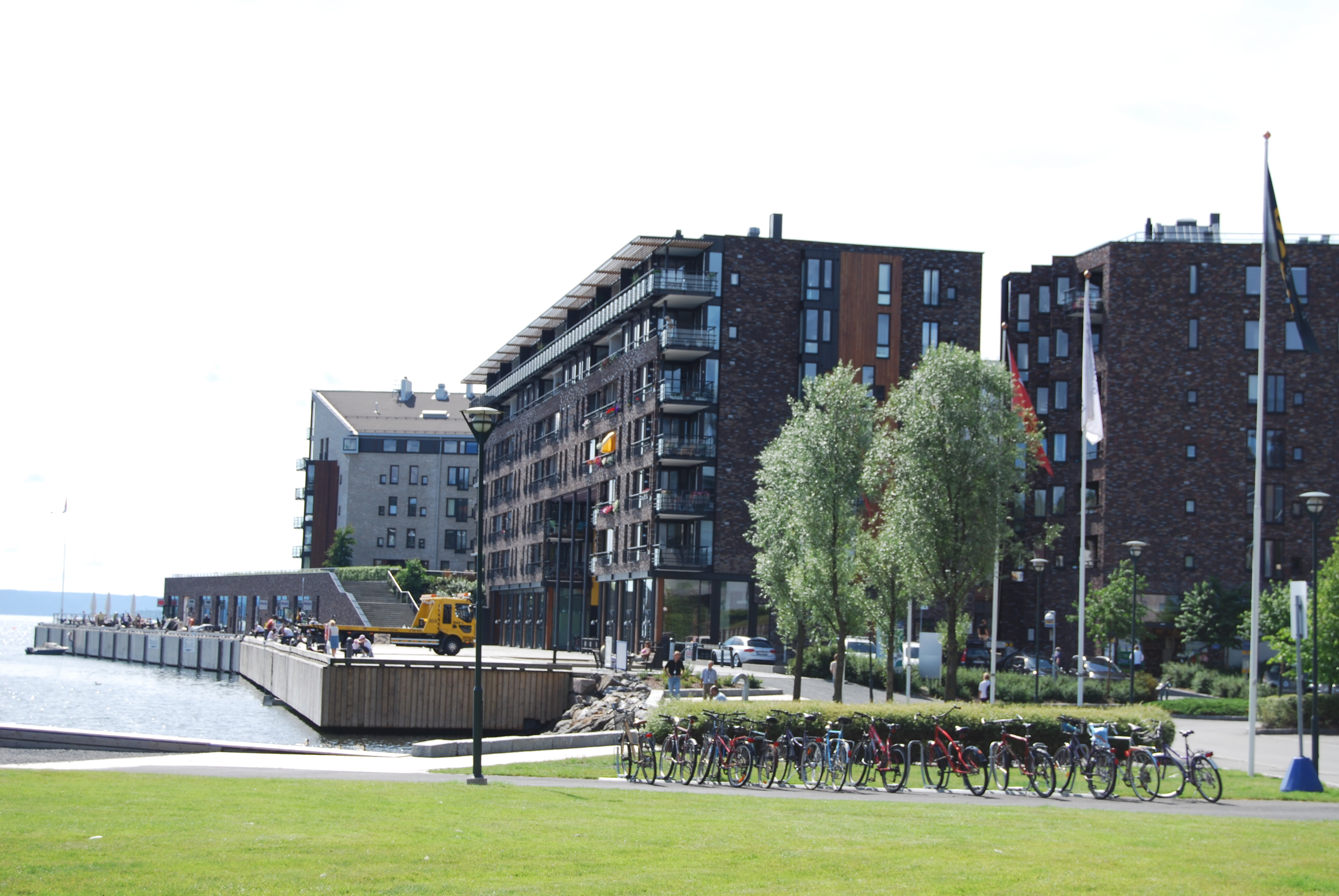 Lysaker (Oslo) 2009 r.